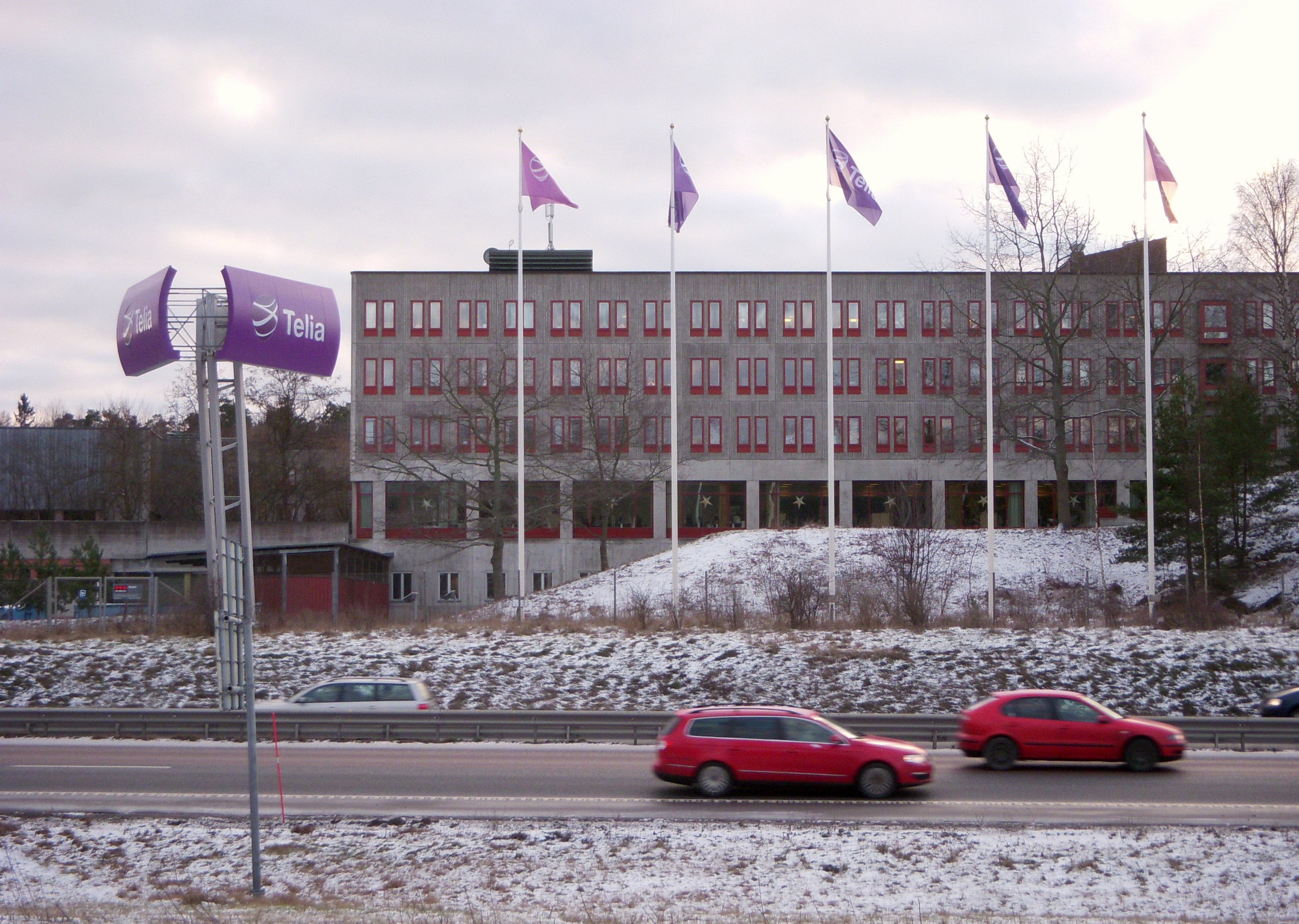 Larsboda, TeliaSoneras huvudkontor